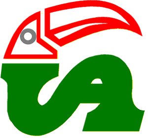 Simboliza iniciales UA de color verde con la ilustraciin de la cabeza de un tucan sobre la U de color rojo